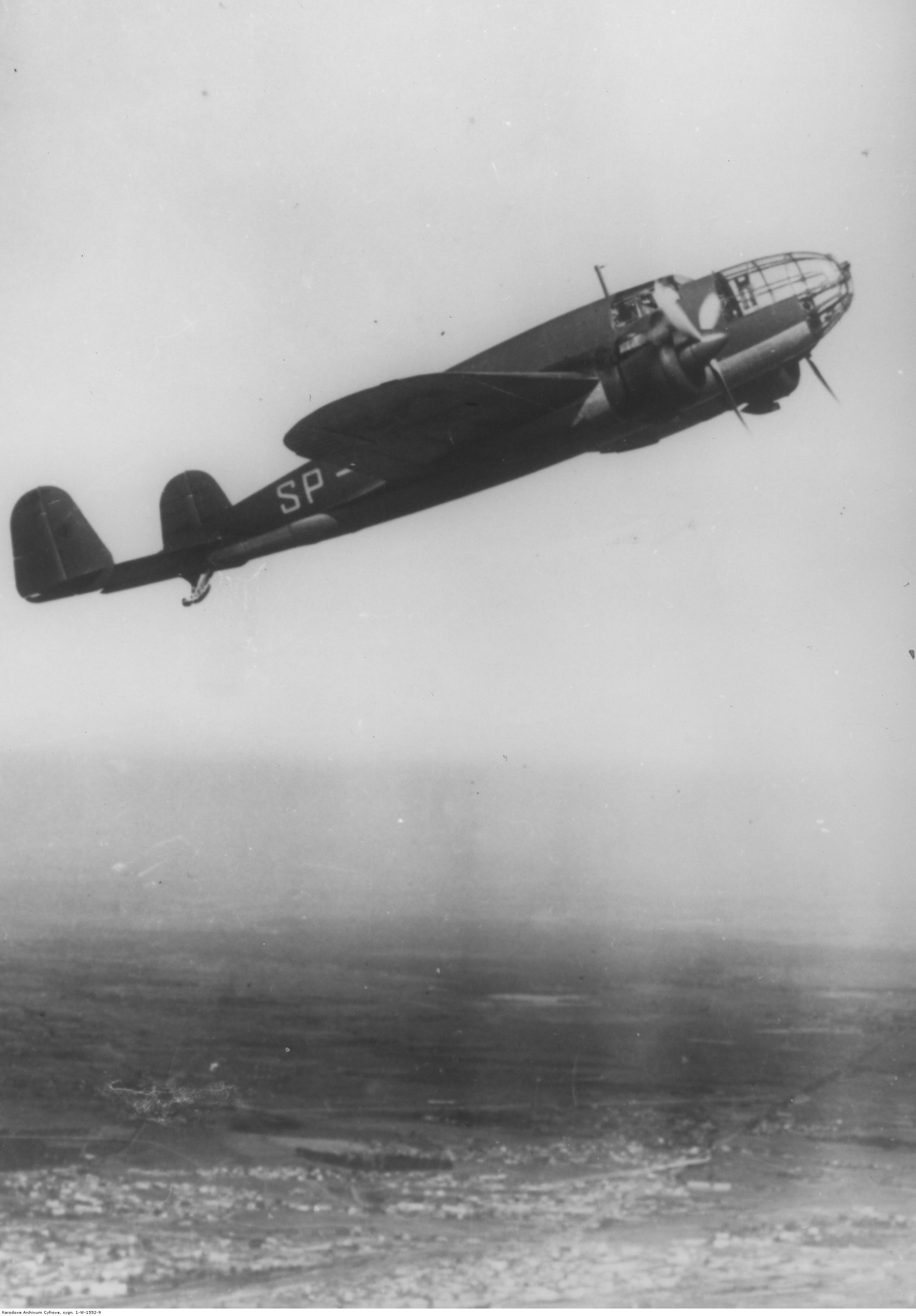 Samolot PZL-37A bis Łoś z cywilnymi znakami rozpoznawczymi SP-BNL podczas lotu.